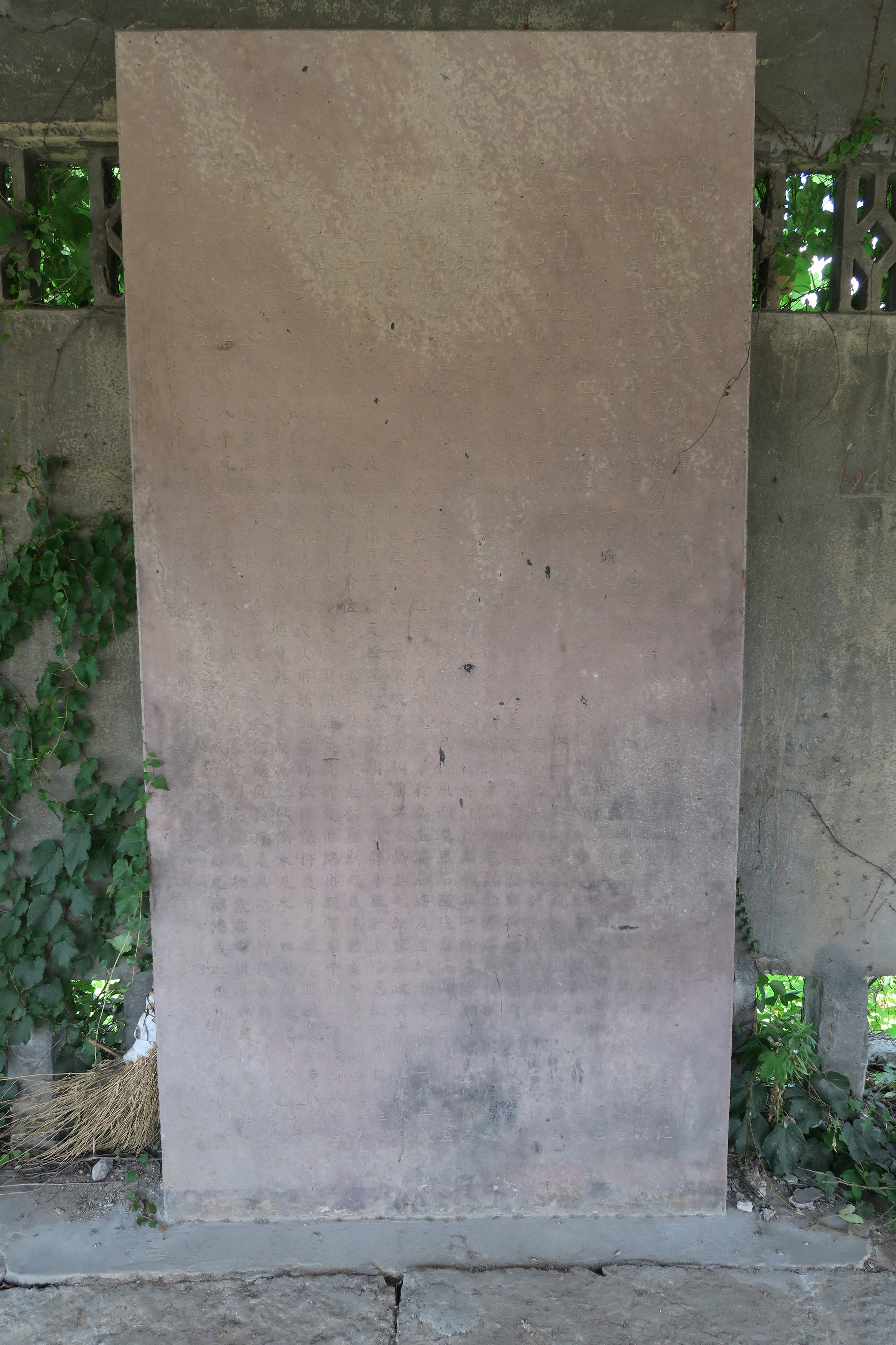 镇海后海塘嘉燮亭